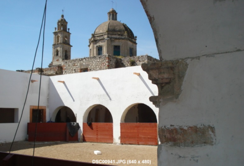 Vista al templo de la hacienda de peñuelas desde un patio interior